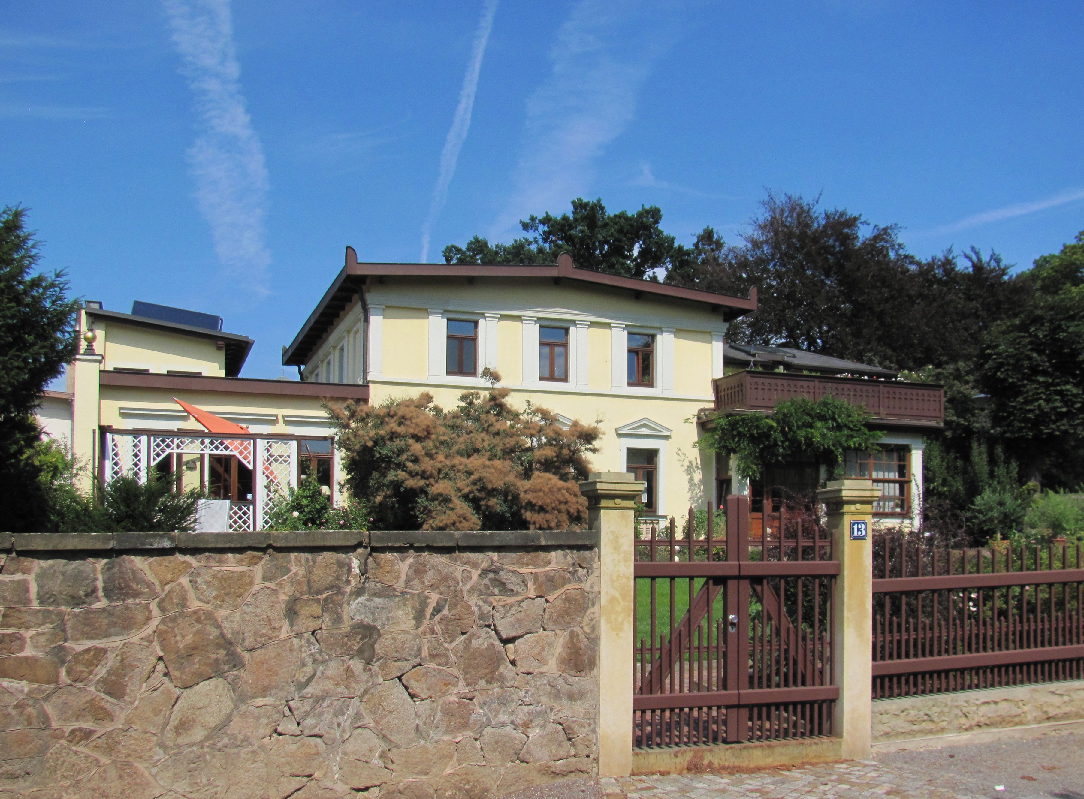 Radebeul-Oberlößnitz, Villa Agnes (Lößnitzgrundstr. 2, ehemals Nizzastr. 13), von 1891 bis 1895 Wohnsitz von Karl May